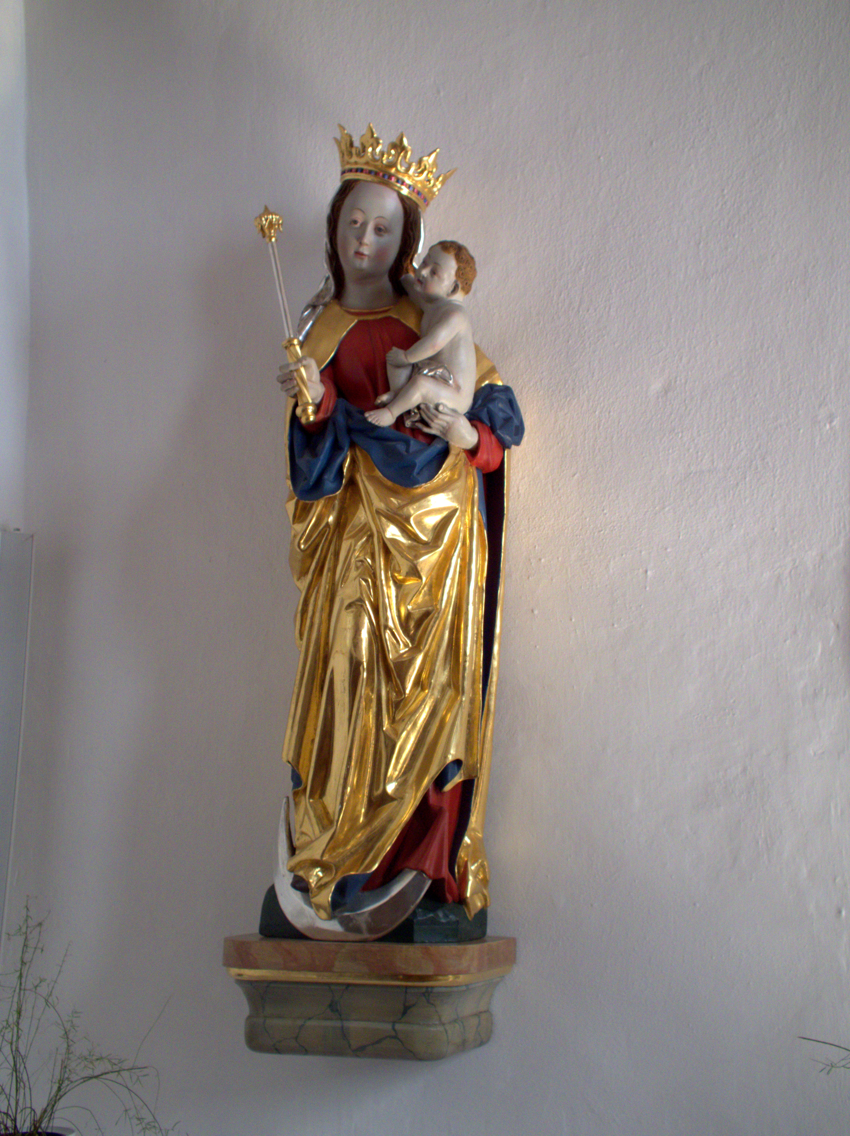 Kirche St. Nikolaus in Reichertshofen / Kreis Neumarkt Oberpfalz:Statue Mondsichelmadonna